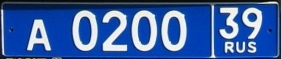 Russisch politie kenteken